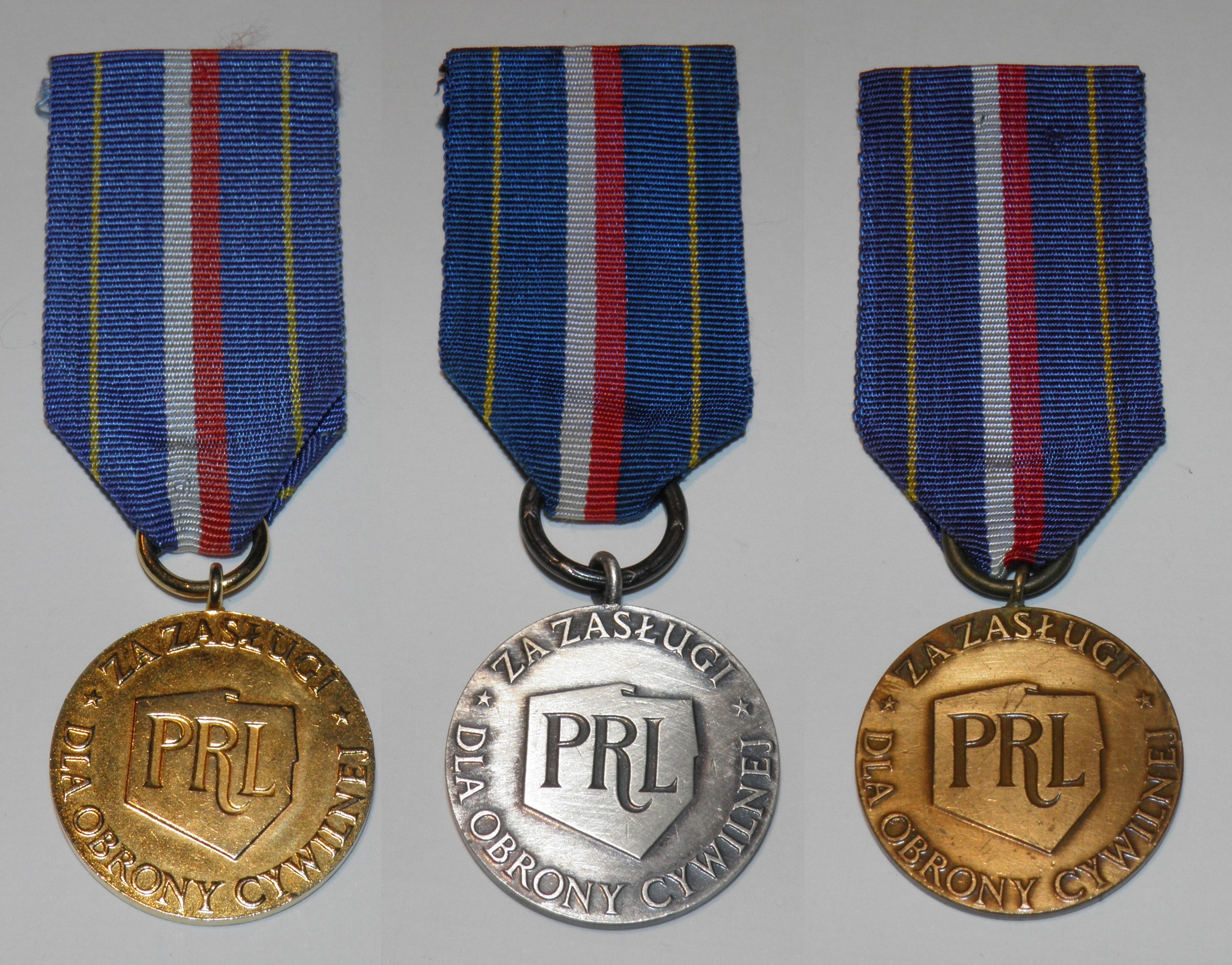 Odznaka Za Zasługi dla Obrony Cywilnej komplet